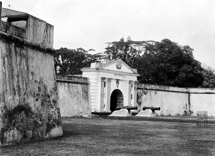 Repronegatif. Gerbang laut Fort Victoria, Ambon, seusai pemugaran tahun 1928